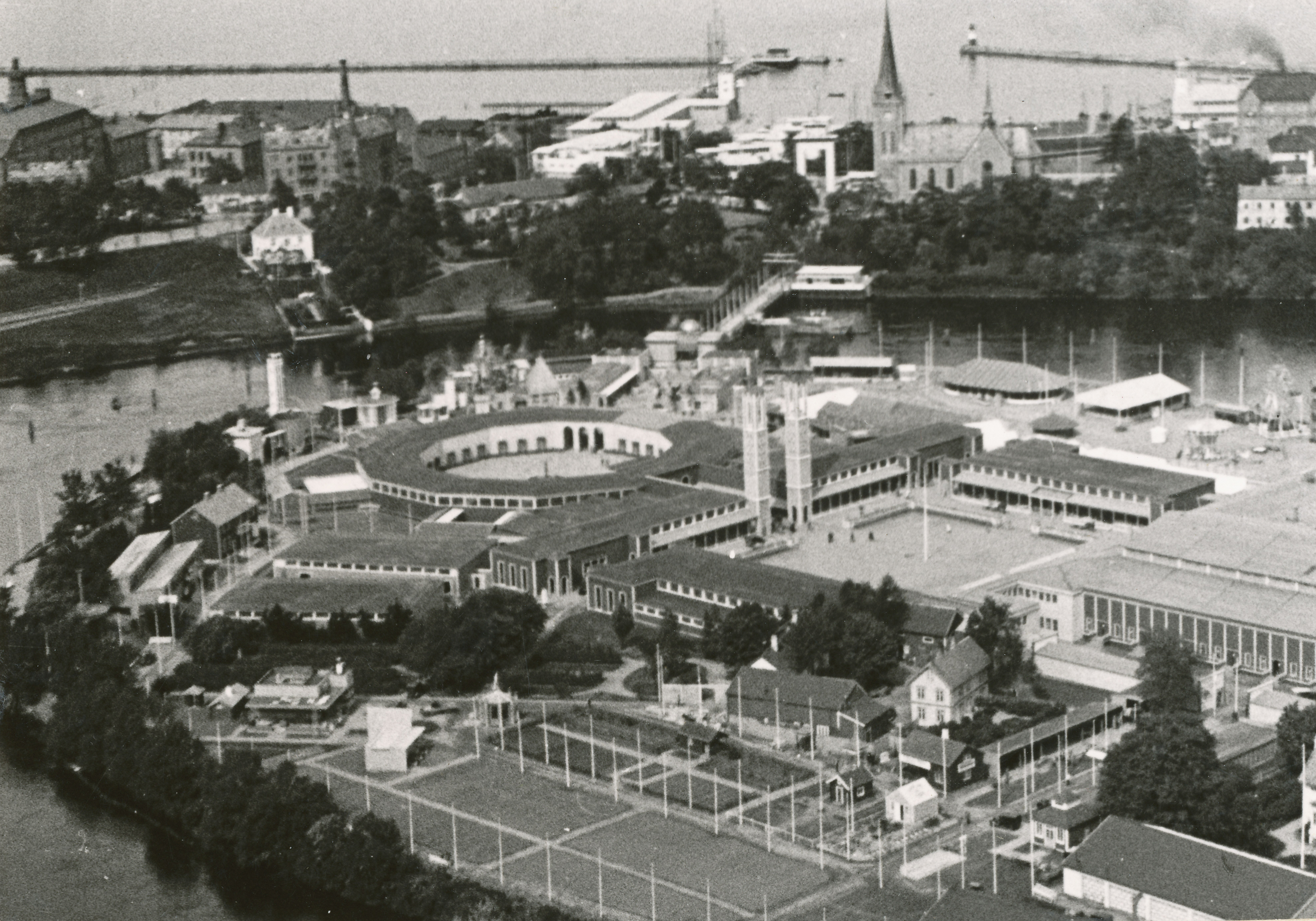 Trøndelagsutstillingen 1930. Oversikt over utstillingsområdet. Ukjent fotograf.